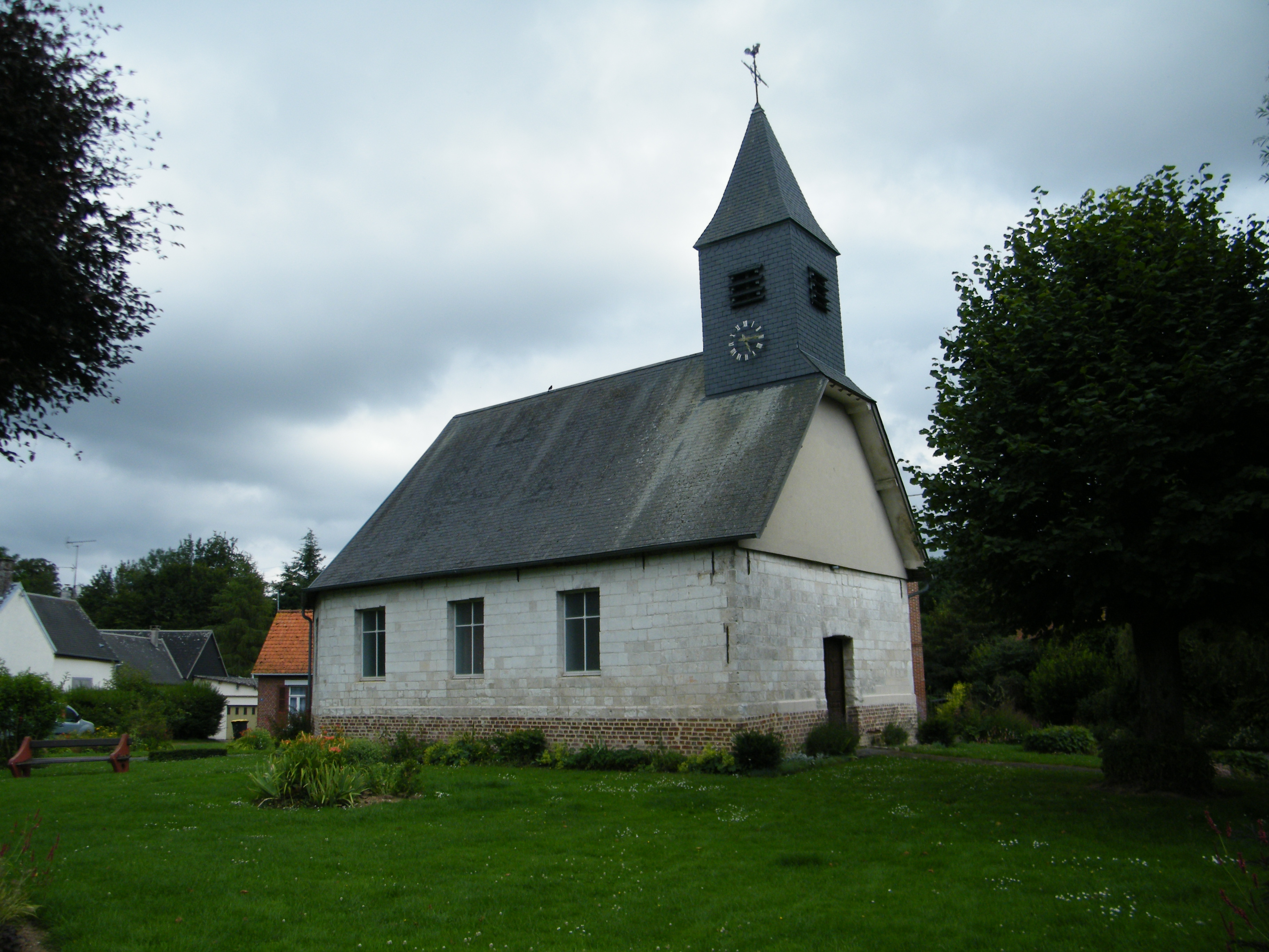 Eglise sur la place.